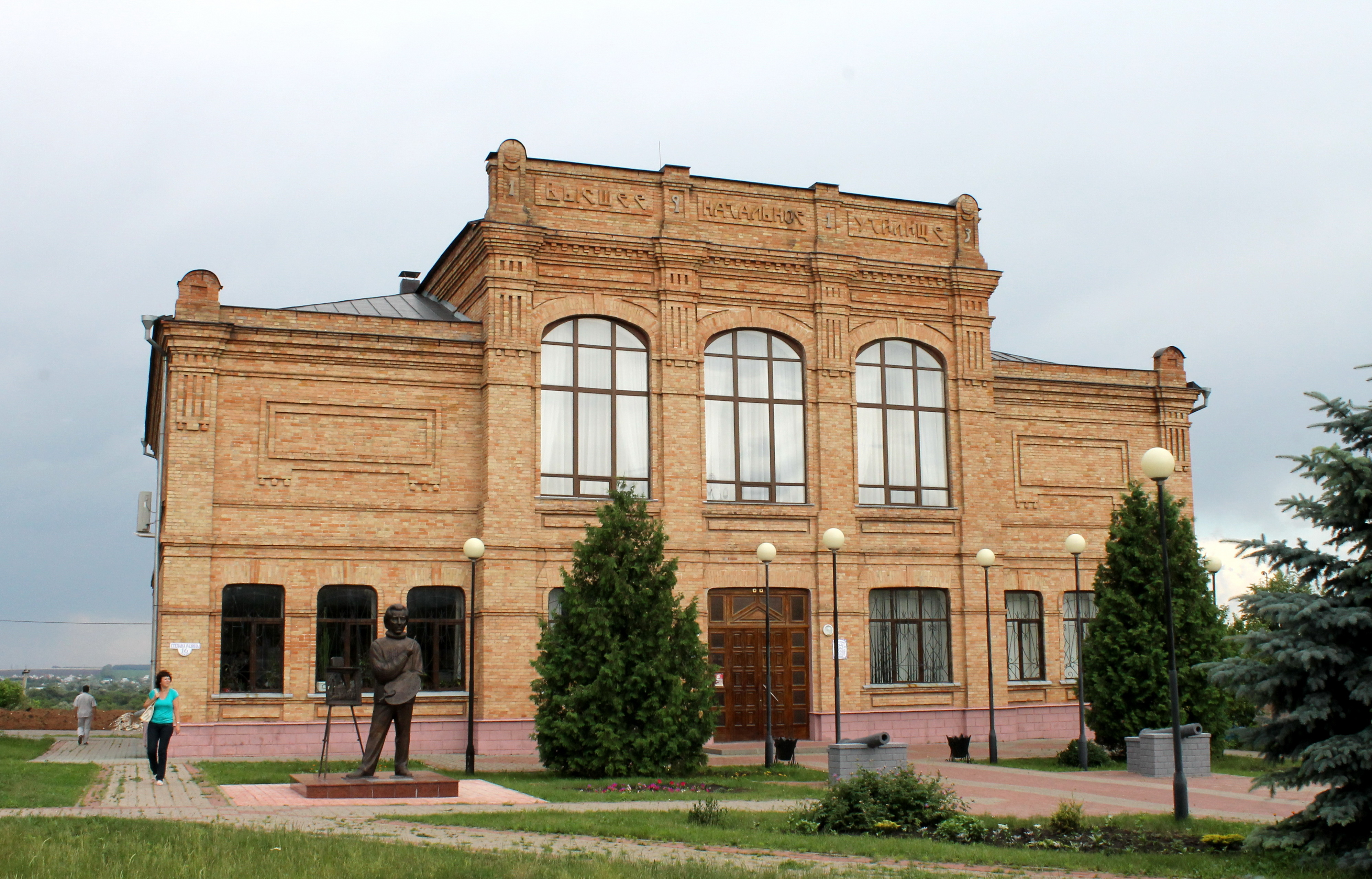 Валуйский историко-художественный музей (здание бывшего Высшего начального училища)